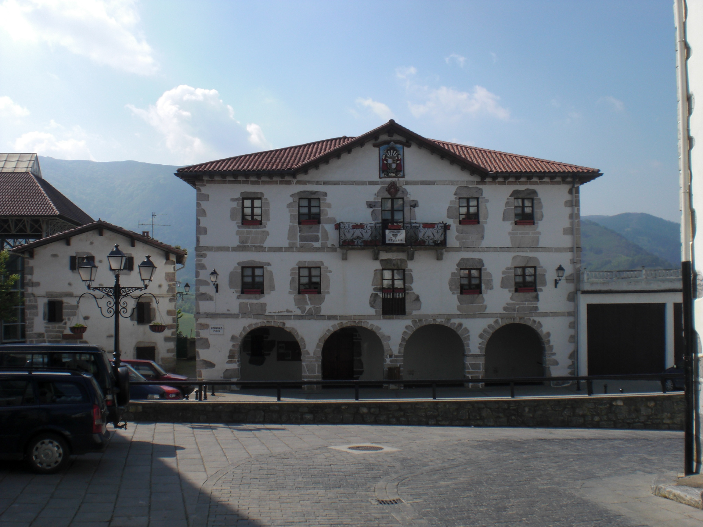 Arantzako udaletxea.